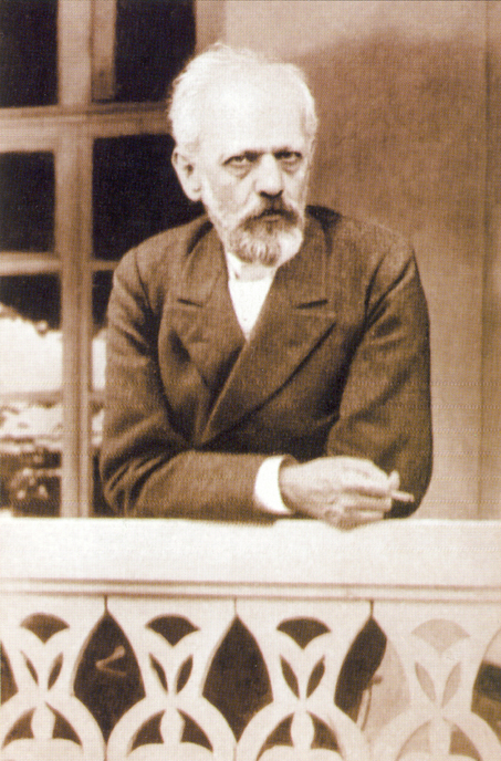 Pyotr Ilyich Tchaikovsky